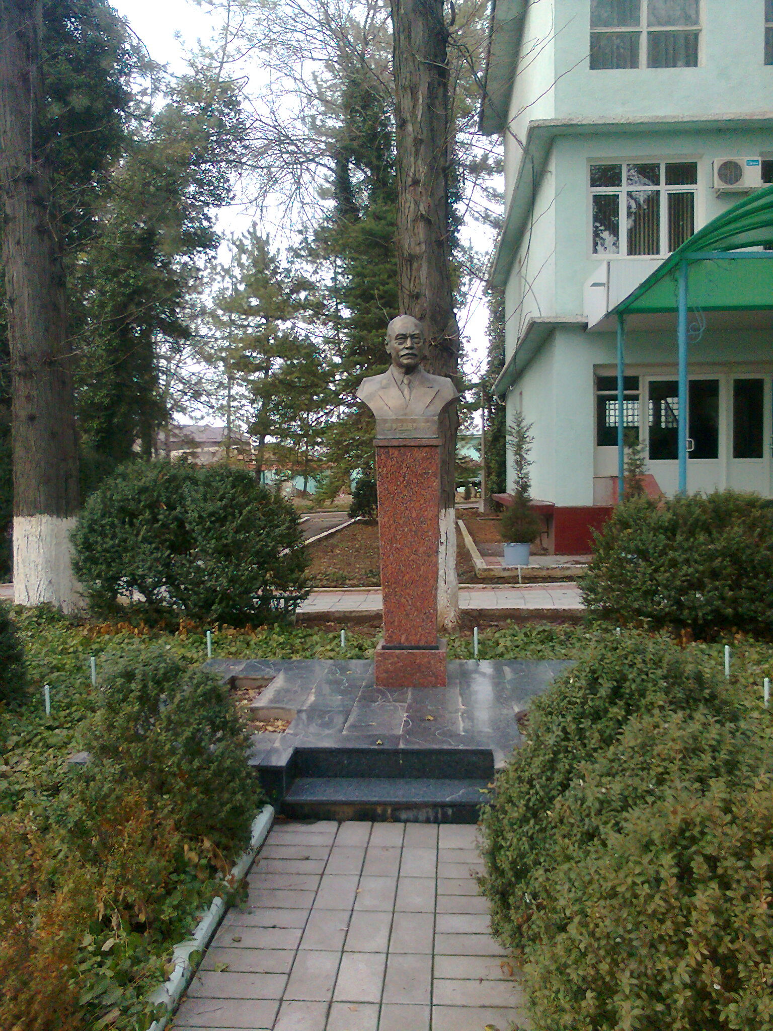 Бюст Рихарда Рихардовича Шредера в Ташкенте. Узбекский научно-исследовательский институт Садоводства, виноградарства и виноделия имени М.Мирзаева (бывший Институт Р.Р.Шредера)